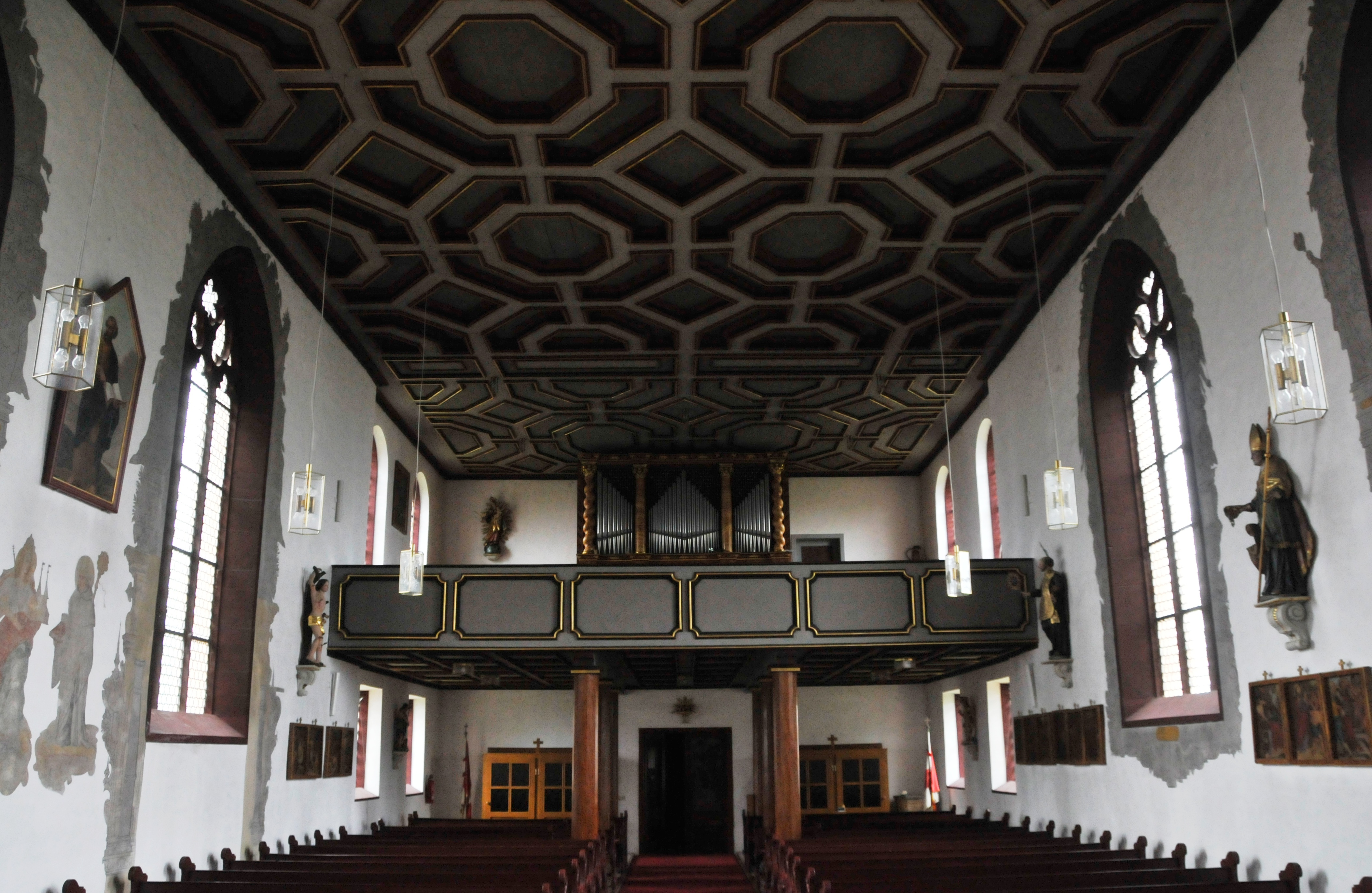 Wolfmannshausen, Kirche